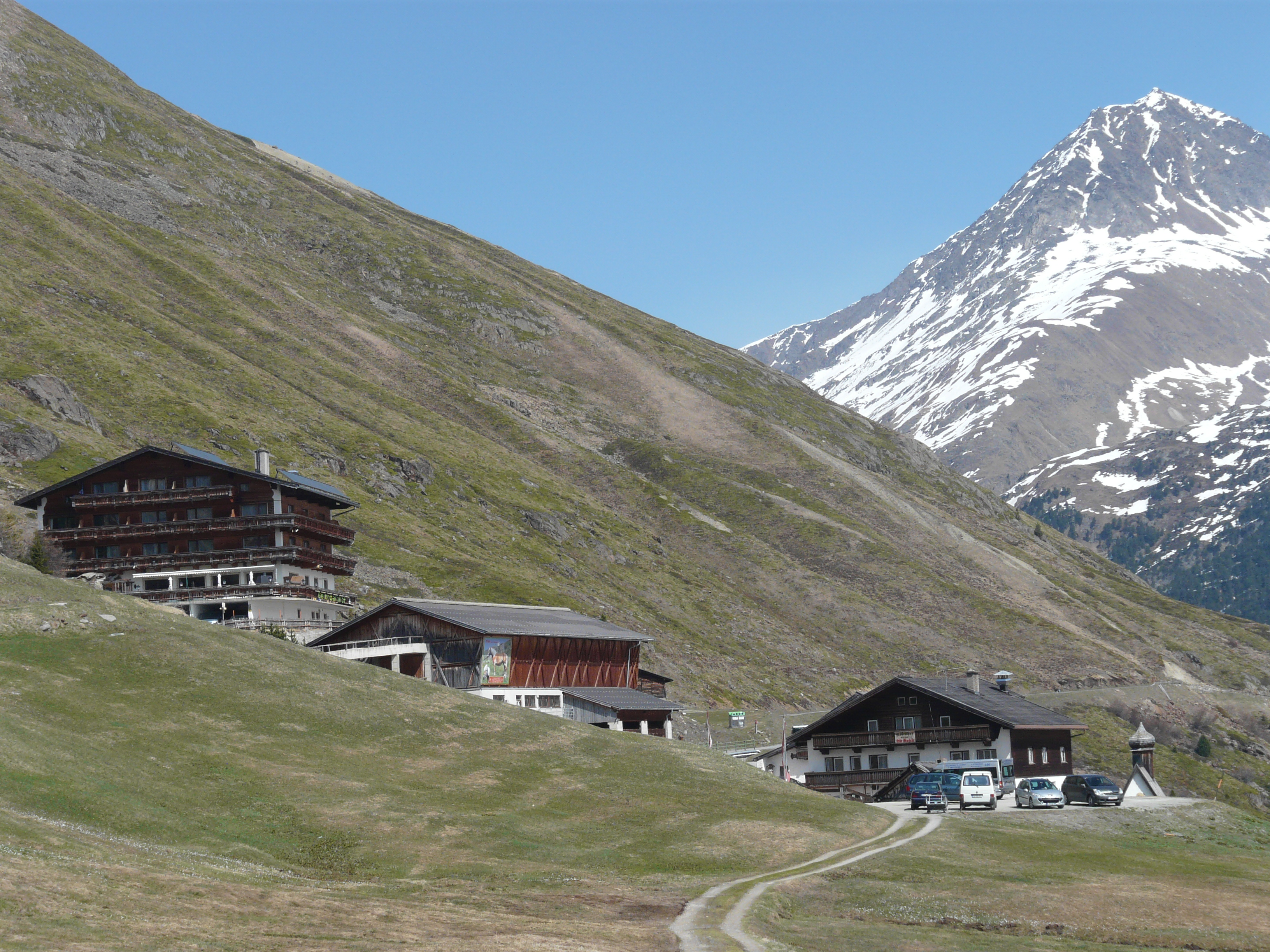 Die Rofenhöfe, Österreichs höchstgelegene Bergbauernhöfe